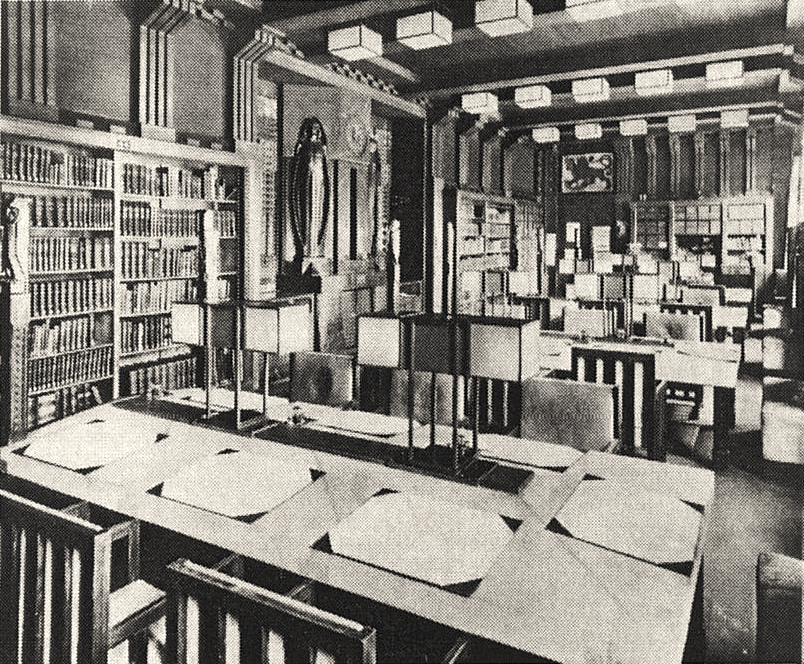 Peter Behrens gestaltete den Lesesaal (mit Zedernholz verkleidet) für die neuen Bibliotheksräume der Landes- und Stadtbibliothek im Kunstgewerbemuseum Düsseldorf am Friedrichsplatz (heute Grabbeplatz) in 1906